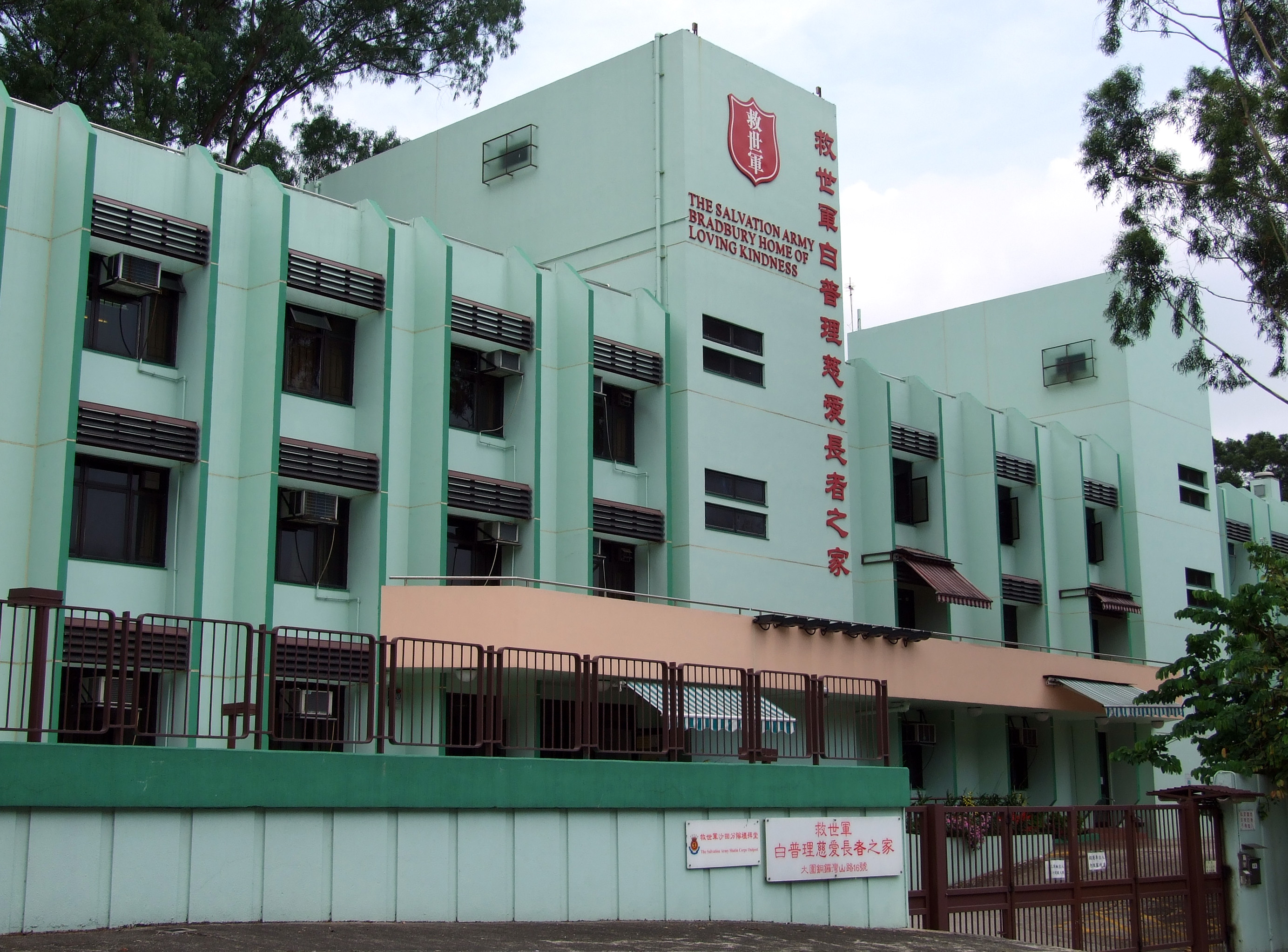 中文（香港）: 香港救世軍白普理慈愛長者之家